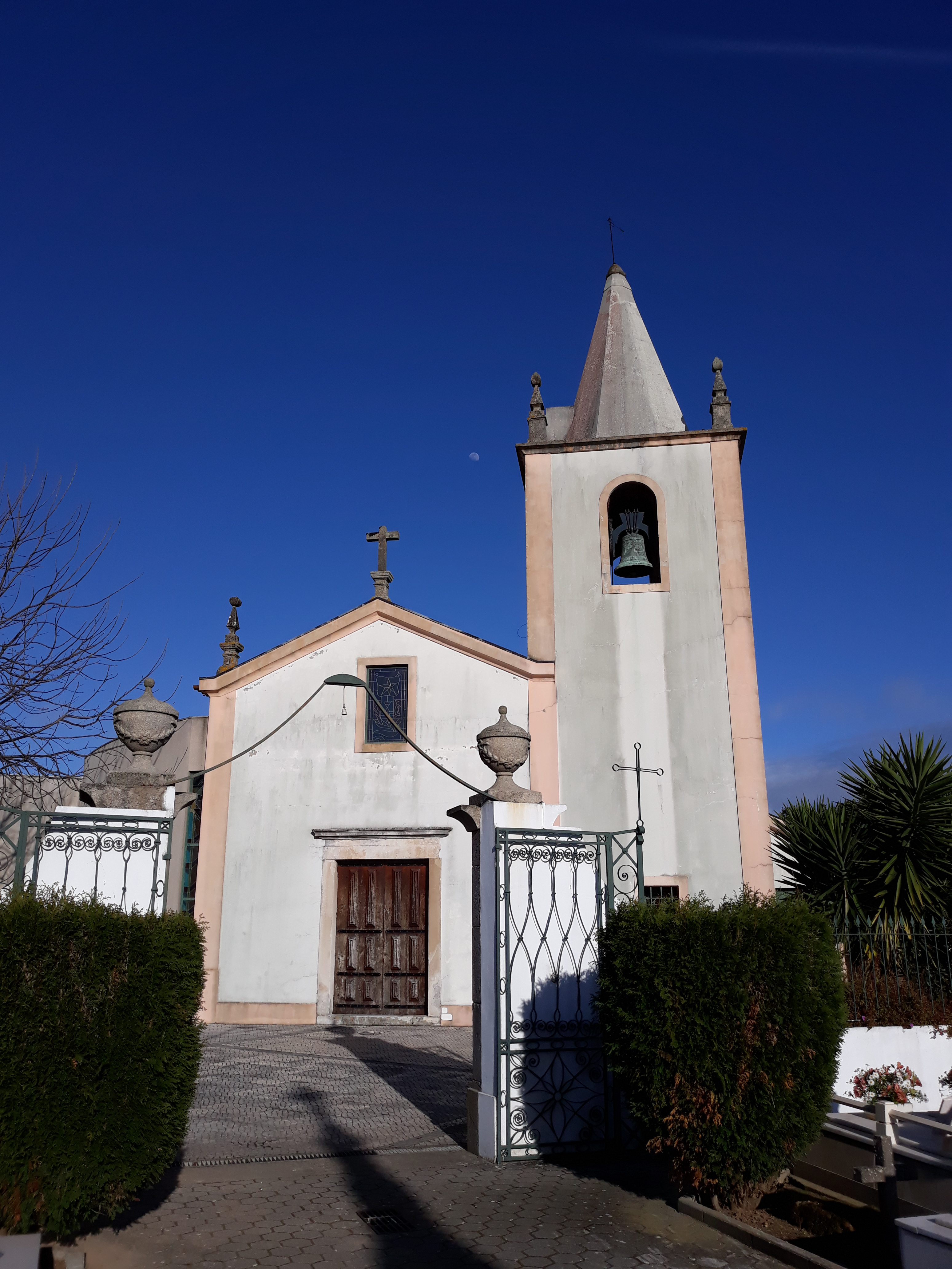 Igreja de Eirol